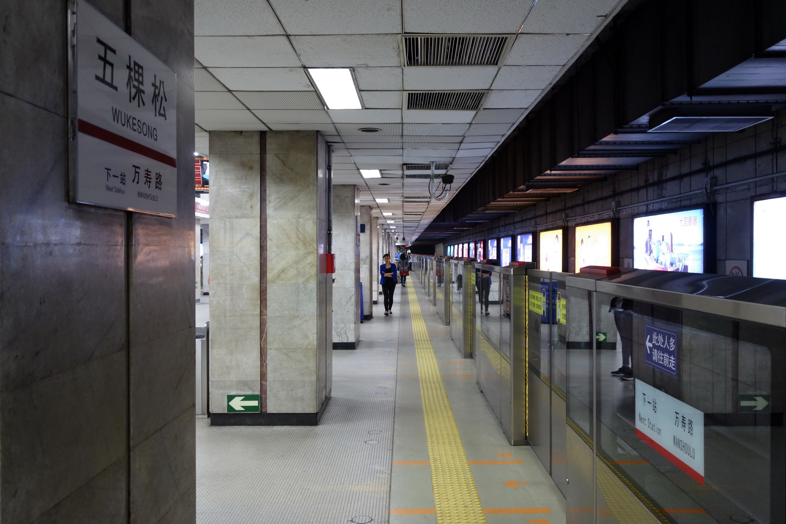 北京地铁1号线五棵松站站台。站台加装半高式屏蔽门，2017年投入使用。